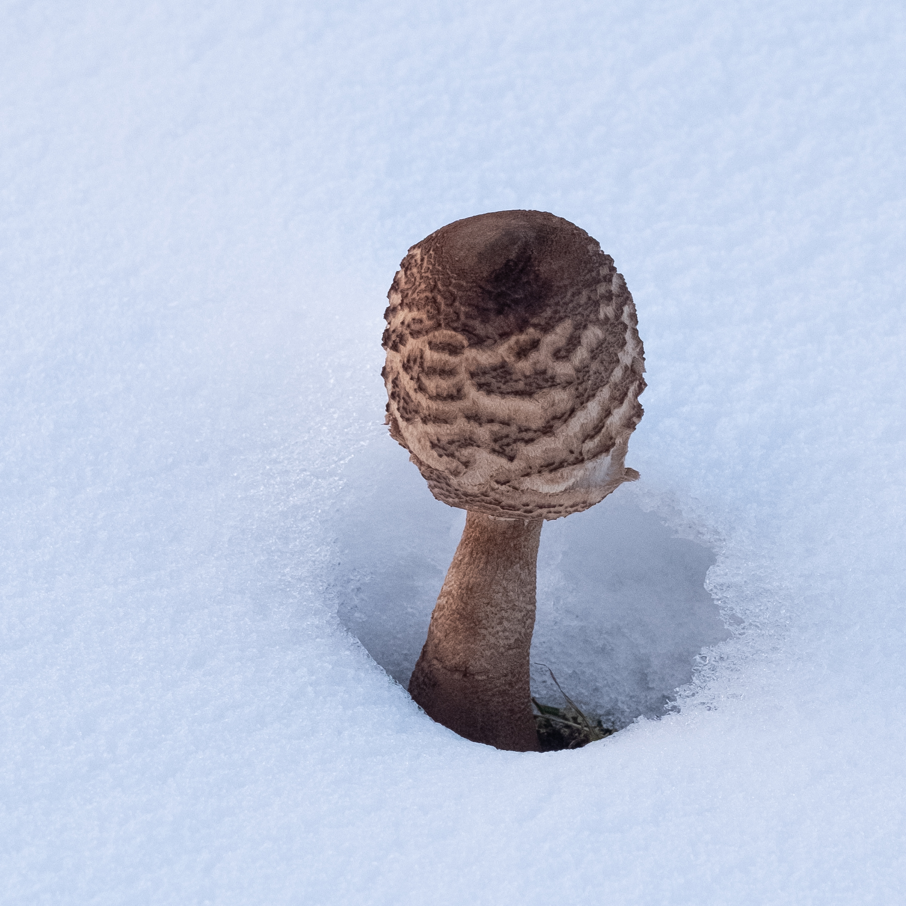 Junger Parasolpilz (Macrolepiota procera) im Schnee, Naturschutzgebiet Alter Berg (Kennung 3.231), Böttingen, Landkreis Tuttlingen, Baden-Württemberg, Deutschland